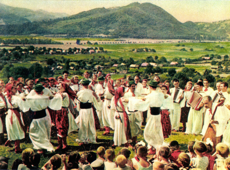 Ансамбль Боржава, село Довге